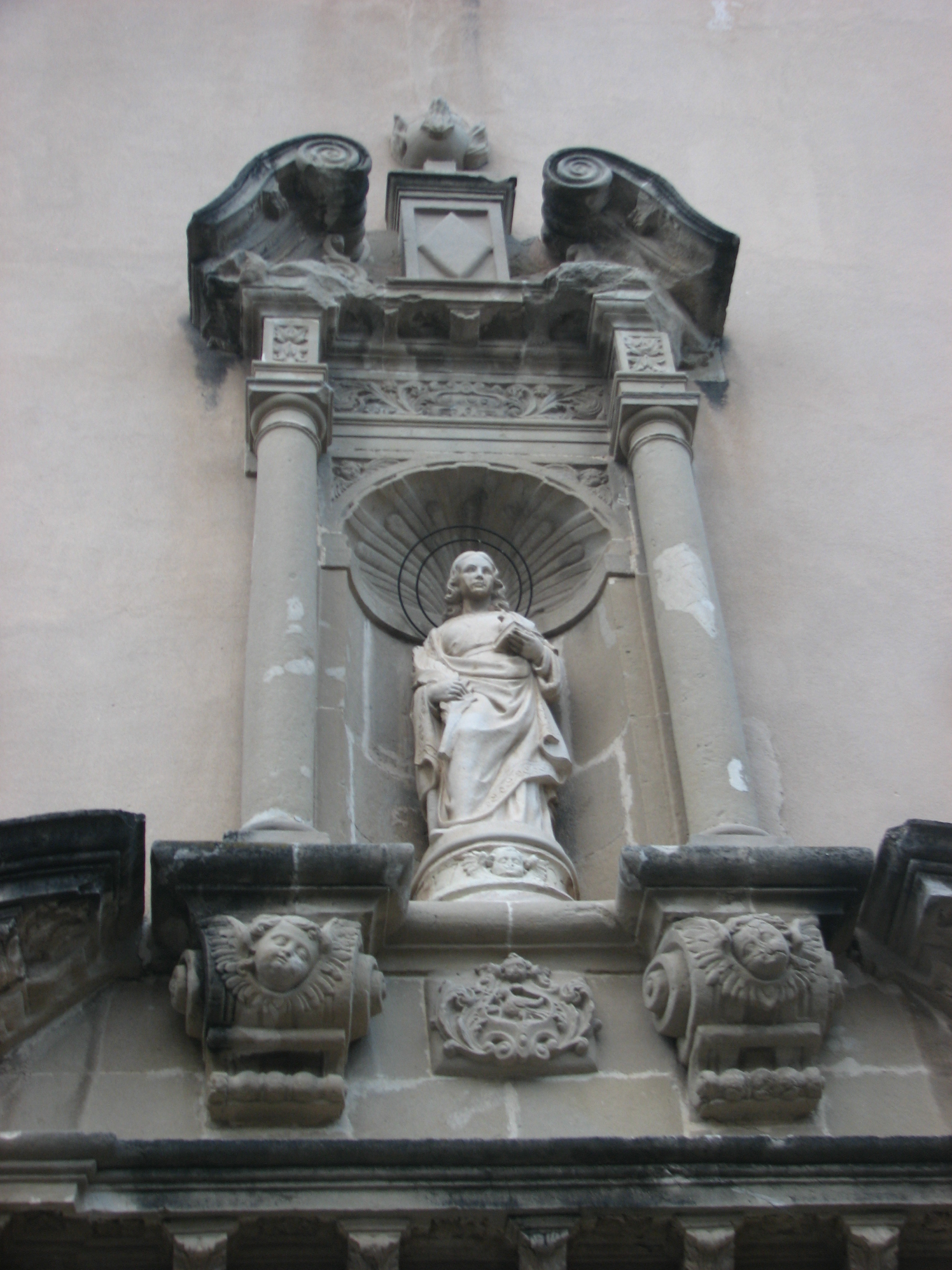 Església parroquial de Santa Coloma (Centelles)